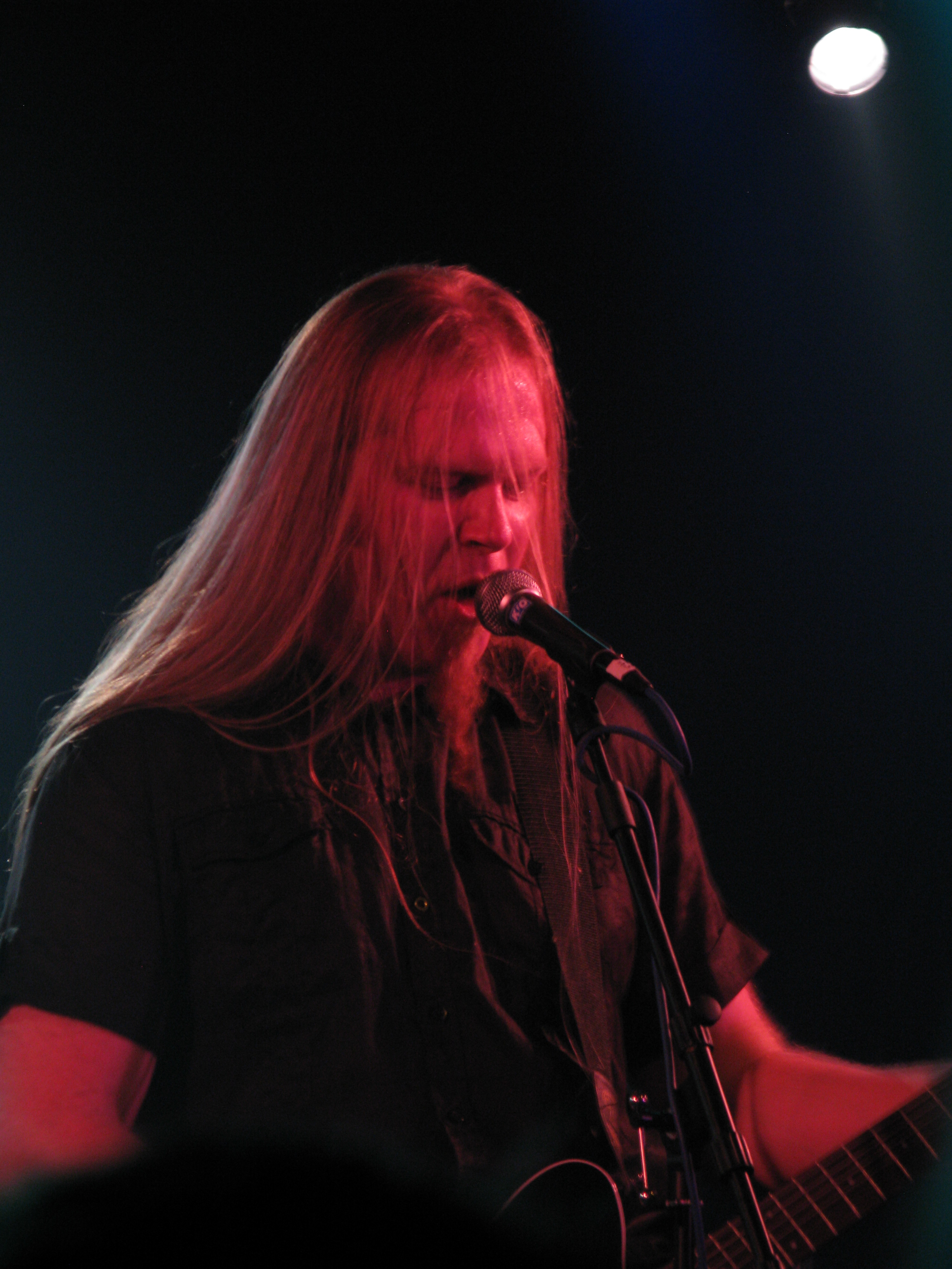 Morten Veland (Sirenia) Beauty And The Beast Fest @ Biebob, Vosselaar - Belgium